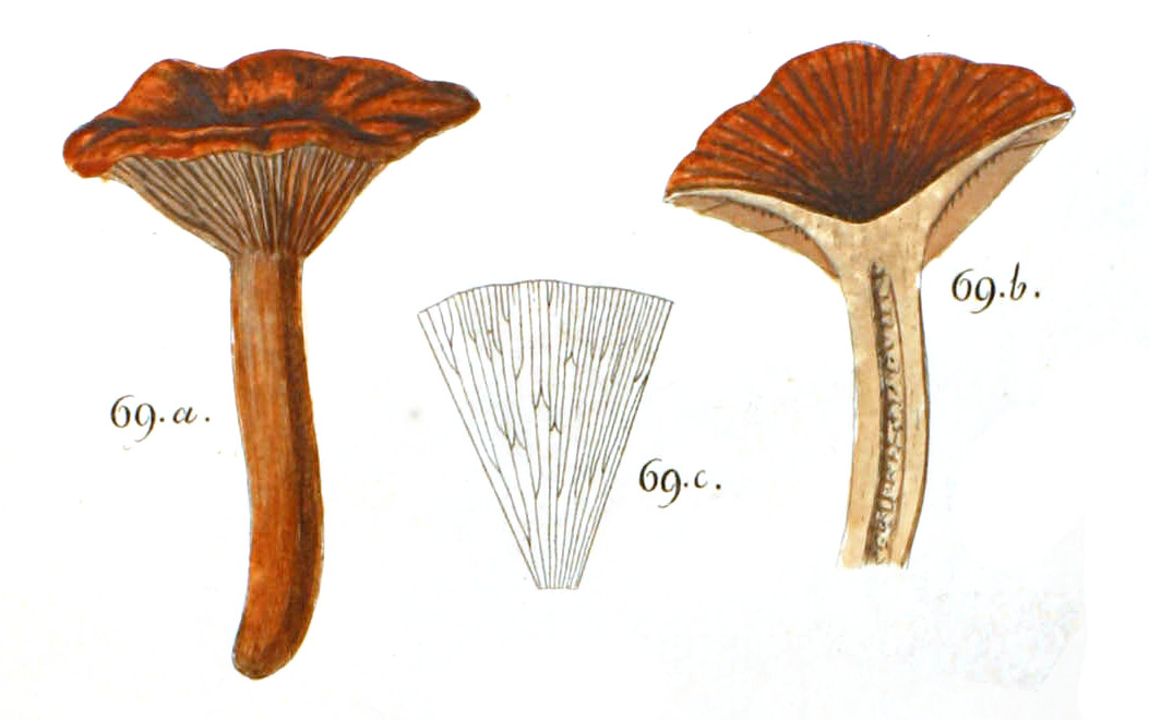 (1797) Elenchus Fungorum. Continuatio Prima Retrieved on January 27, 2013. Abbildungen zu N. 69, A. cimicarius (in the original spelling) a. Ein vollständiger Schwamm b. Ein zerschnittner Schwamm, den welchem die Runzeln am Oberrande der Blättchen, und die Löcher und Gruben in der Höhlung des Stiels zu sehen sind c. Die besondern Verwachsungen der Blättchen Translation Figures for Nr. 69 A complete a fungus b. A cut-up fungus. You can see the wrinkles on the upper edge of the lamellae and the holes and pits in the cave of the stem. c. The peculiar intergrowths of lamellae